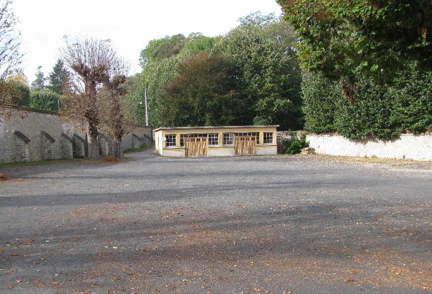 Cour du Couvent des Carmes d'Avon